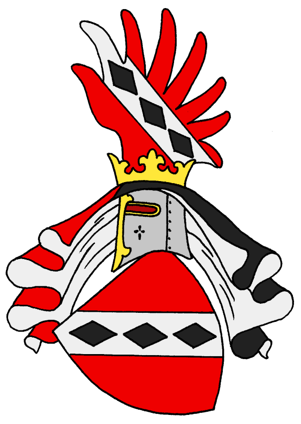 Wappen der Mladota von Solopisk